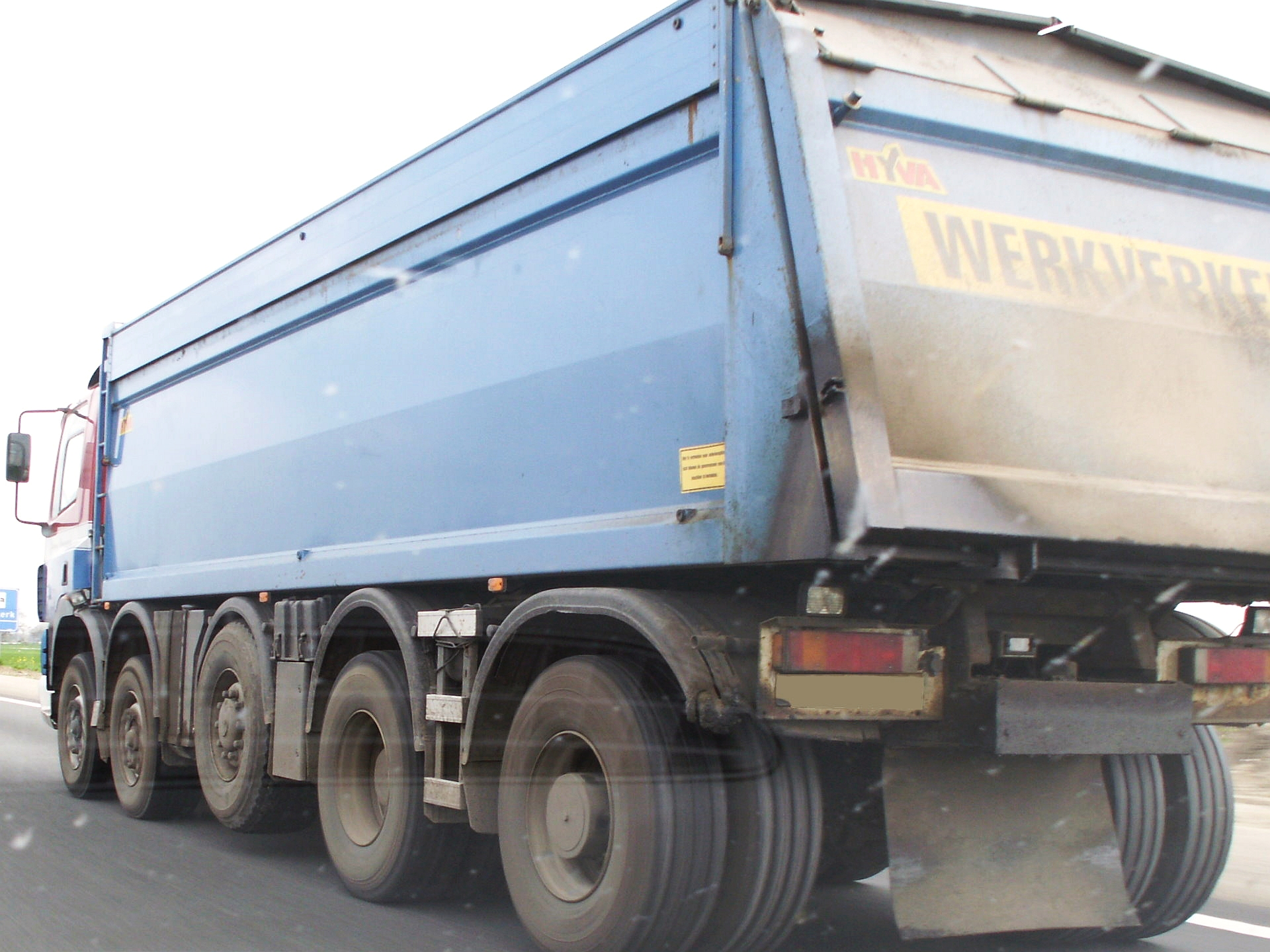 Lastkraftwagen 5-Achser LKW fünfachsig 3 Lenkachsen 1 Liftachse - nicht in DE aber in CH NL usw. - Foto Wolfgang Pehlemann PICT0030